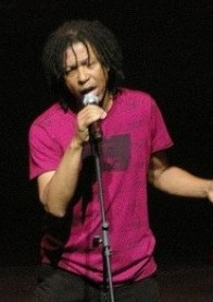 Teatro Caupolican, Santiago de Chile Domingo 18 de Mayo